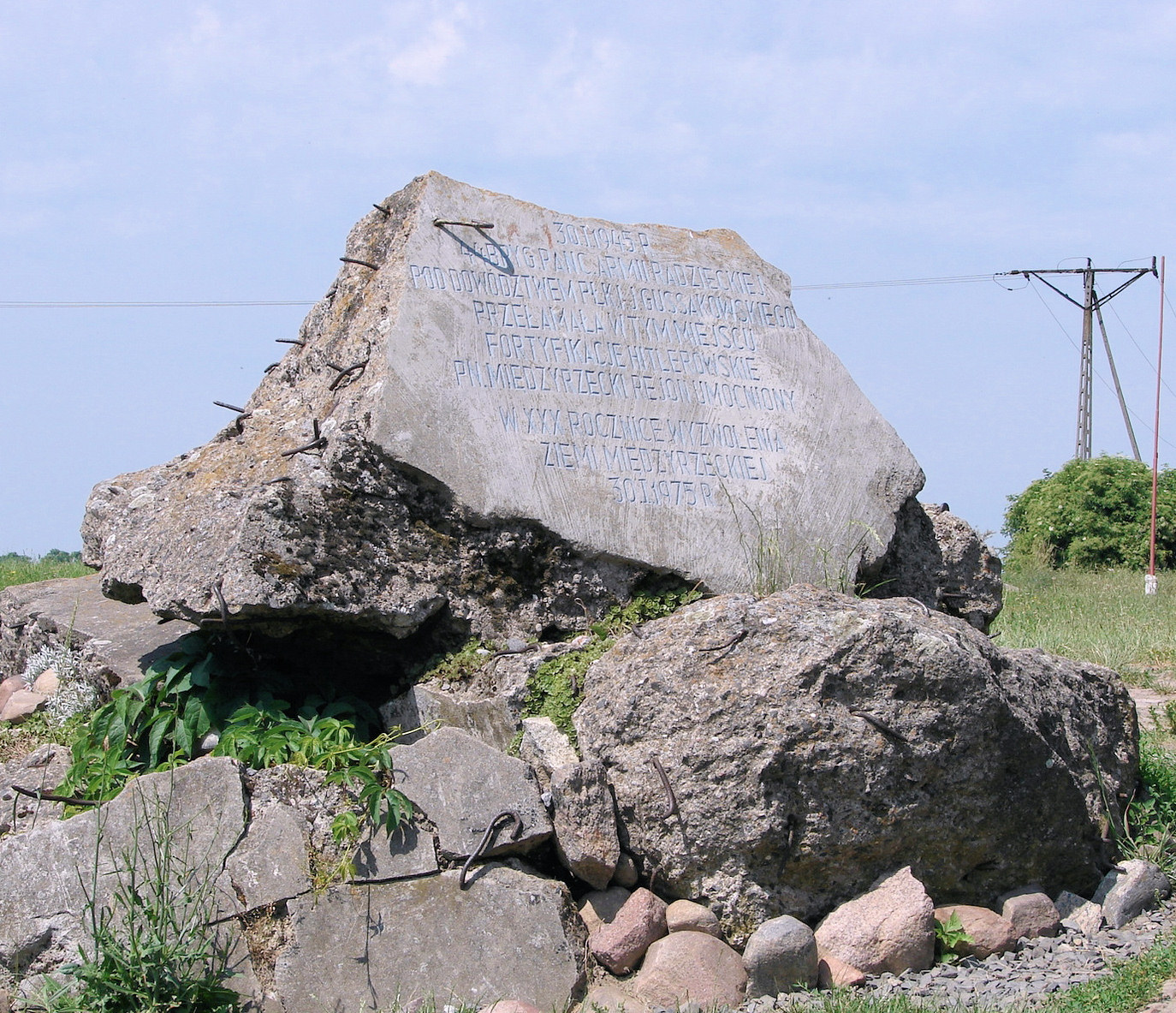 Napis na kamieniu upamiętniający zdobycie fortyfikacji przez Armię Radziecką